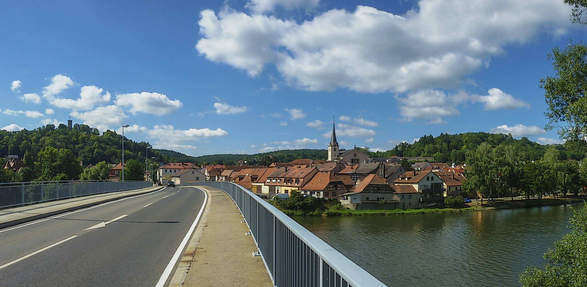 Eltmann, Bayern, Deutschland. Stadtbild mit Wallburg und Mainbrücke.